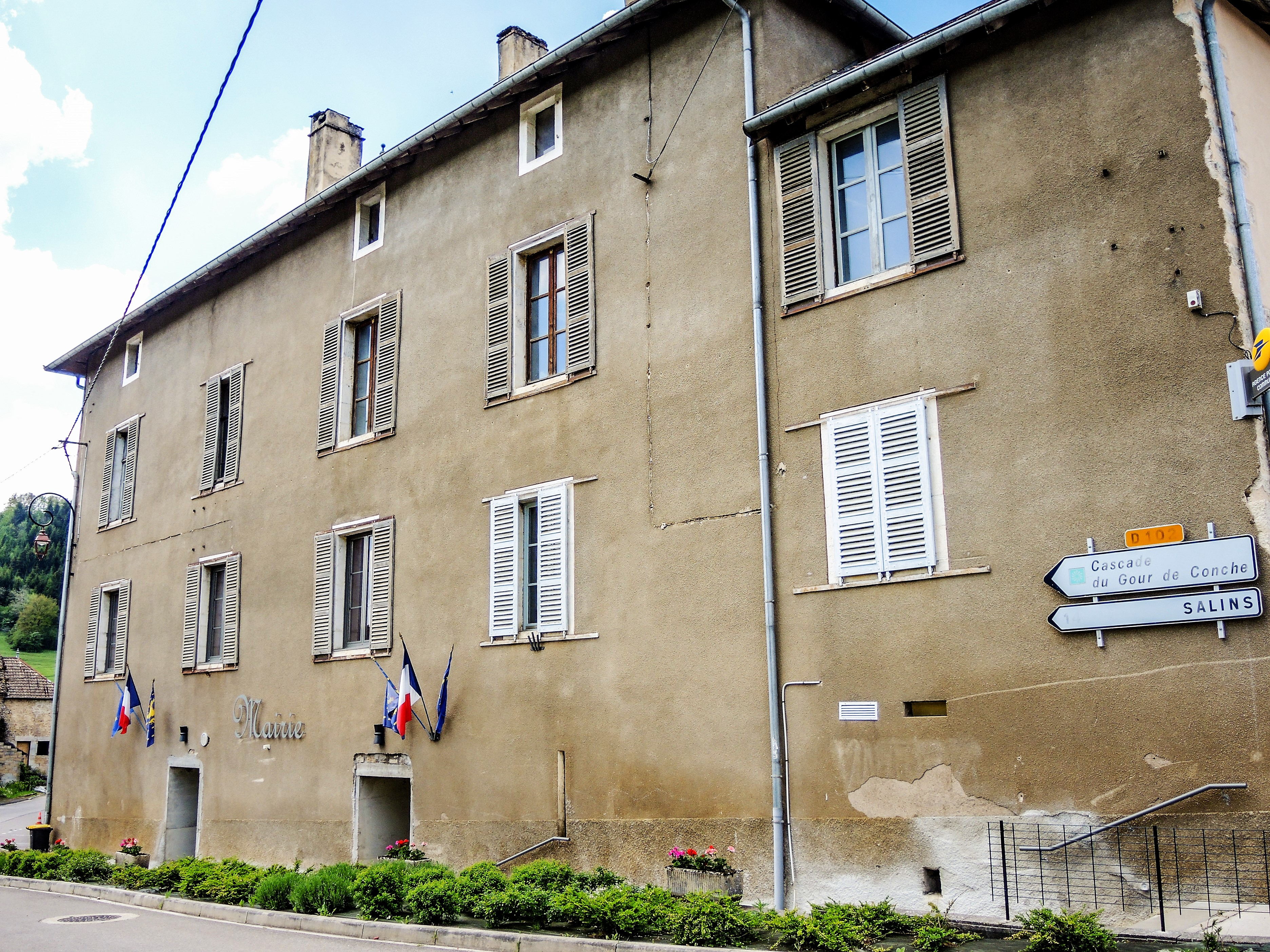 Mairie